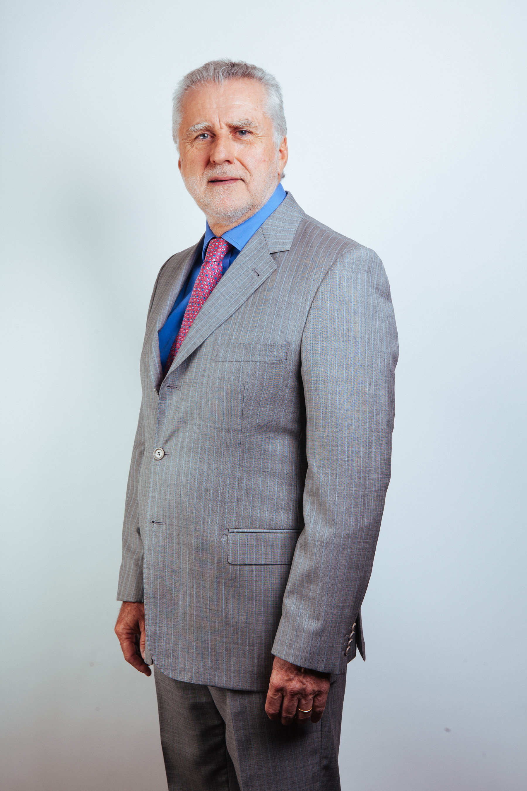 Ministro de Estado del segundo gobierno de Michelle Bachelet (2014-2018)